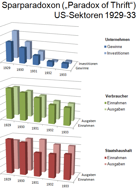 Ausgaben-/Einnahmenreduktion der US-Sektoren gegenseitig und untereinander - Sparparadoxon (Paradox of Thrift) während der Great Depression ab 1929 (bis 33). Abnorme Saldenkonstellation: Die Unternehmen als Gruppe bilden 1932 und 1933 Einnahmeüberschüsse, die Verbraucher als Gruppe entsparen geringfügig 1932 und 1933, die Einnahmen des Staatshaushalts (der öffentlichen Haushalte) sinken gegenüber den Ausgaben, erhöhen trotz (aufgrund) der Verringerung der Ausgaben das jährliche Defizit.